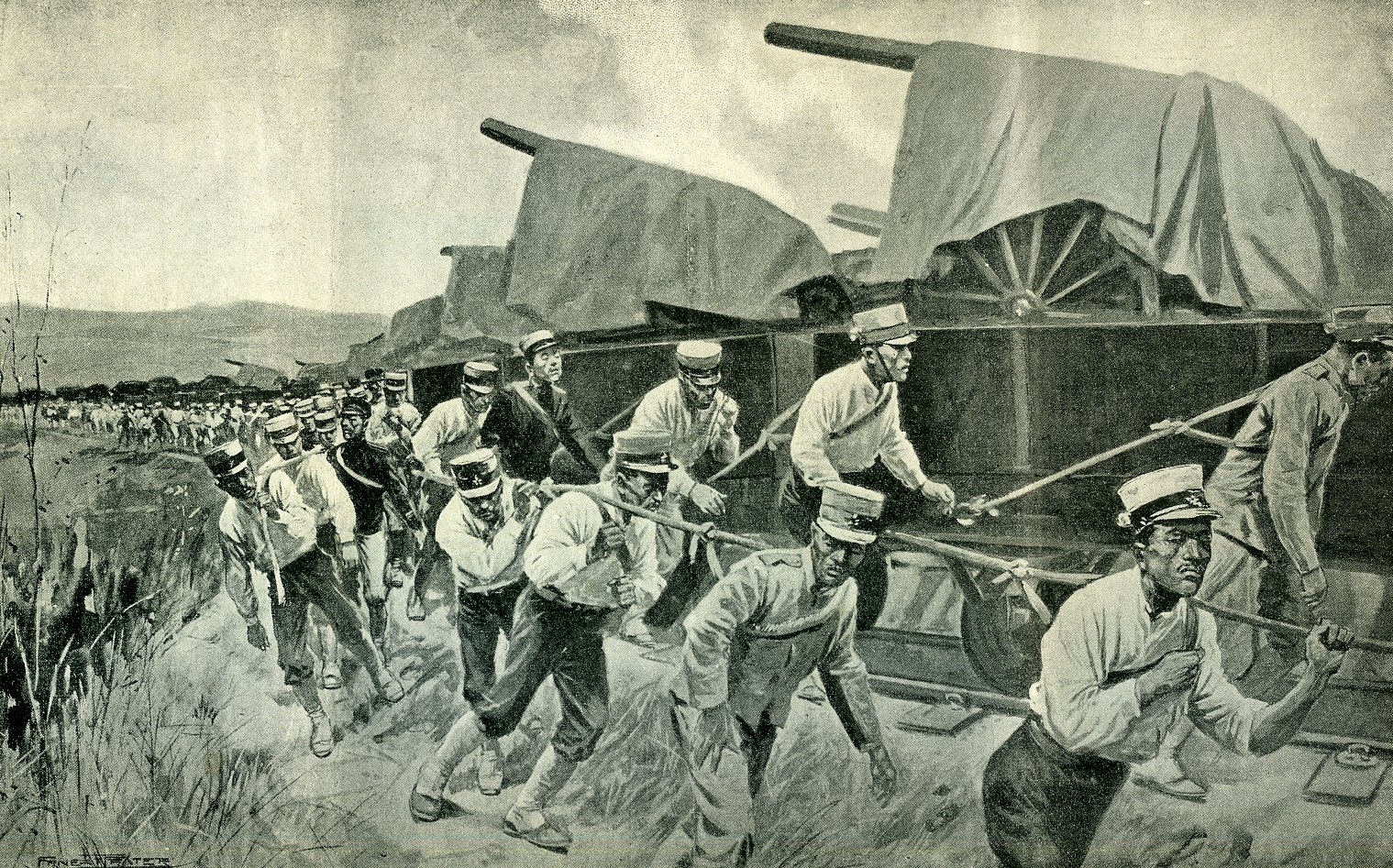 En Mandchourie. La partie de la voie ferrée abandonnée par les Russes est utilisée par les Japonais pour le transport de leurs canons